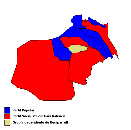 Partits polítics més votats als municipis de l'Horta Sud (País Valencià) després de les eleccions municipals de 2007.